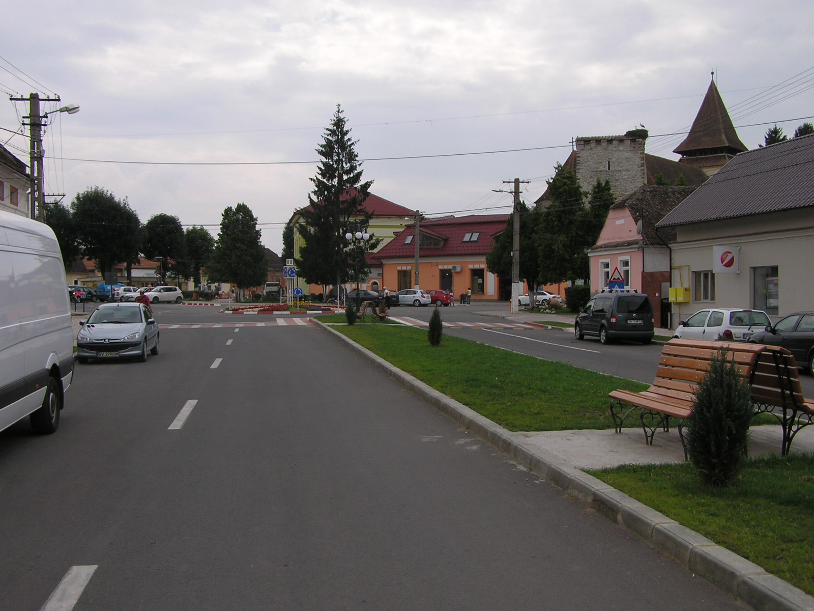 Zentrum von Ghimbav / Weidenbach, Rumänien